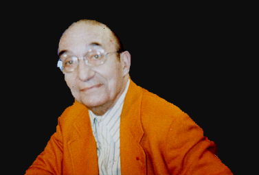 Portrait d'Jean Dewasne.